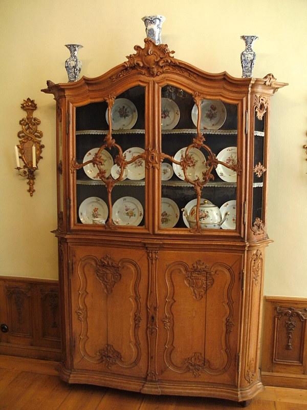 Vitrinenschrank, Couven-Museum, Aachen, Germany